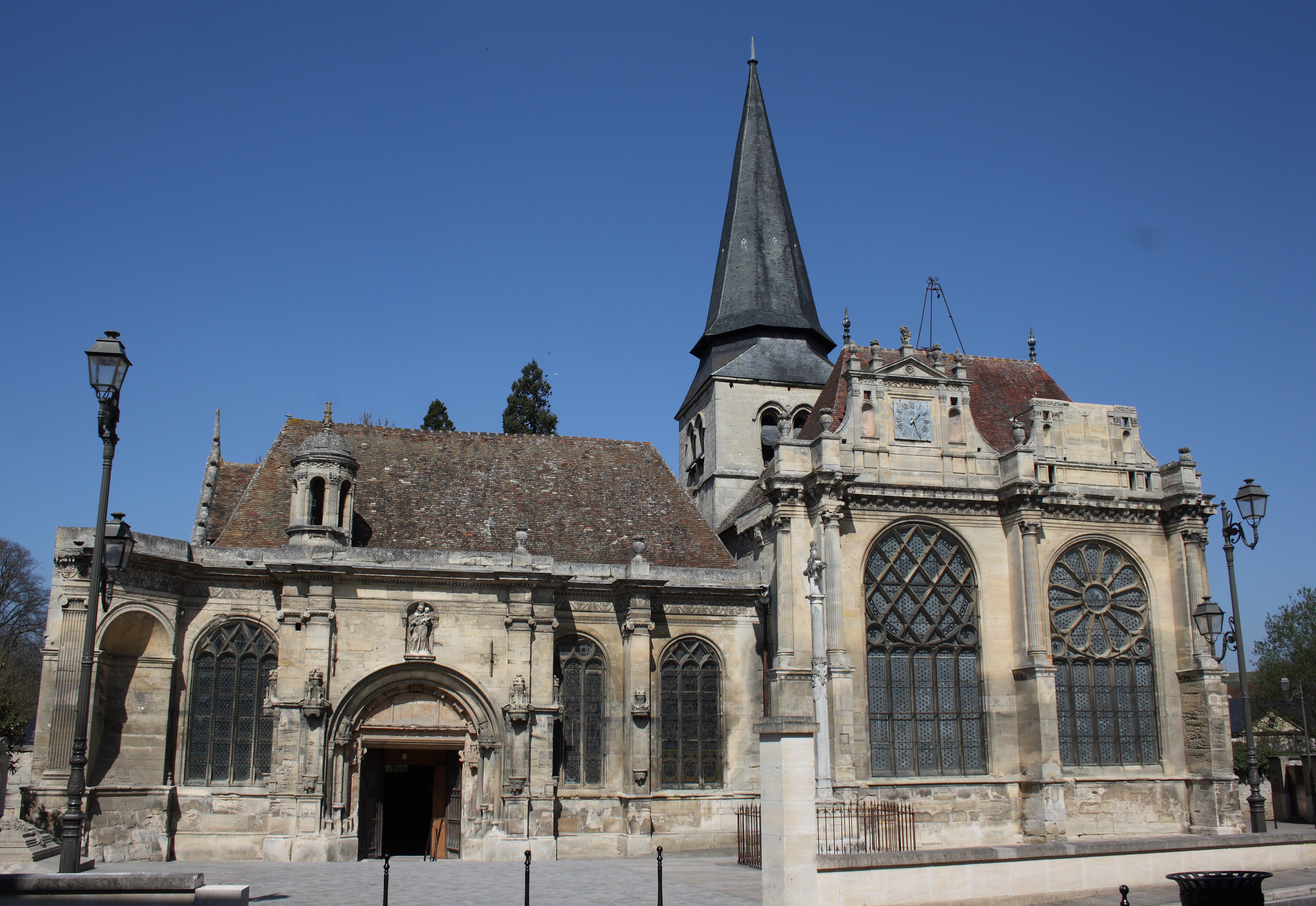 Renaissancefassade der Kirche Notre-Dame-de-la-Nativité in Magny-en-Vexin